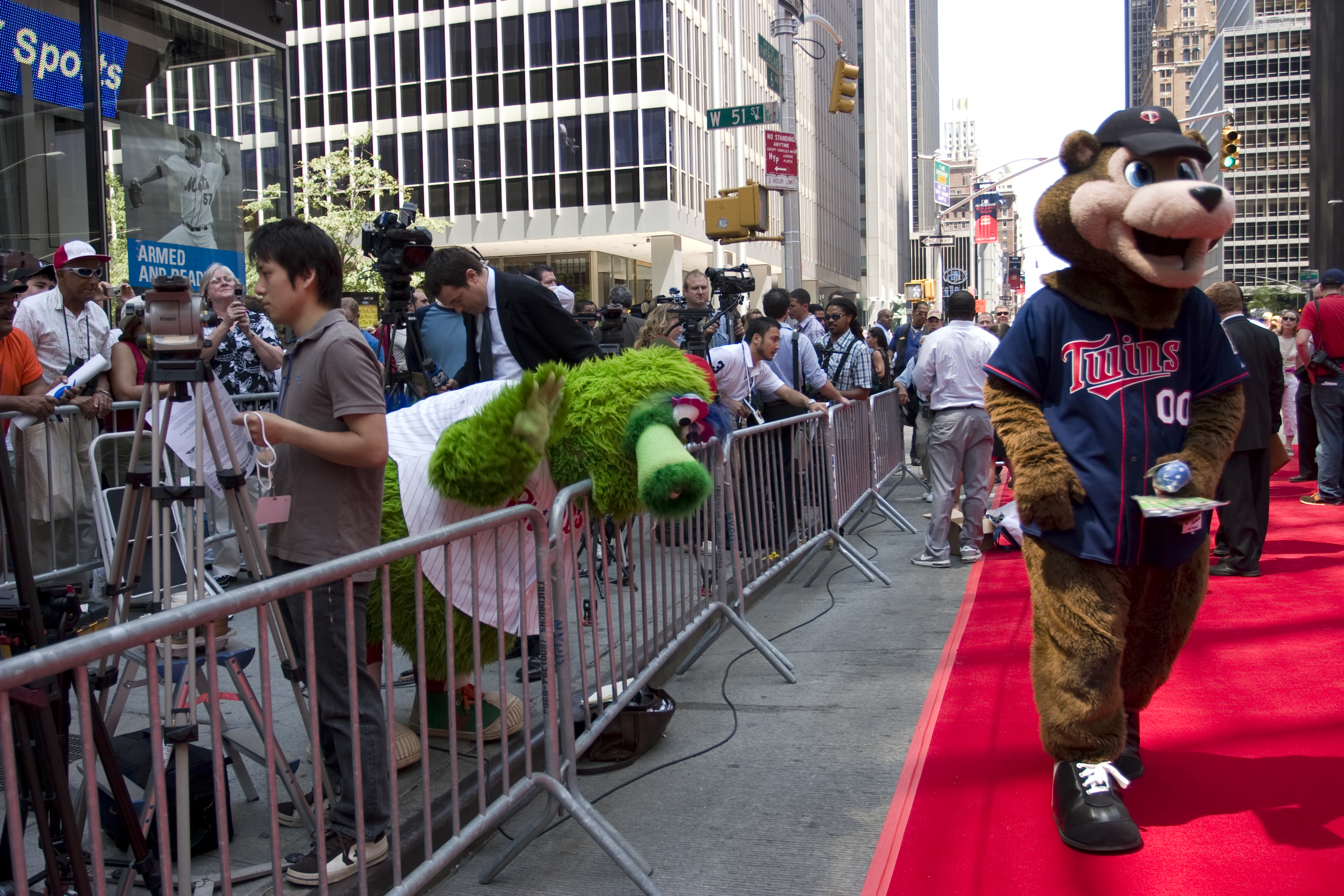 © Rubenstein, photographer Martyna Borkowski